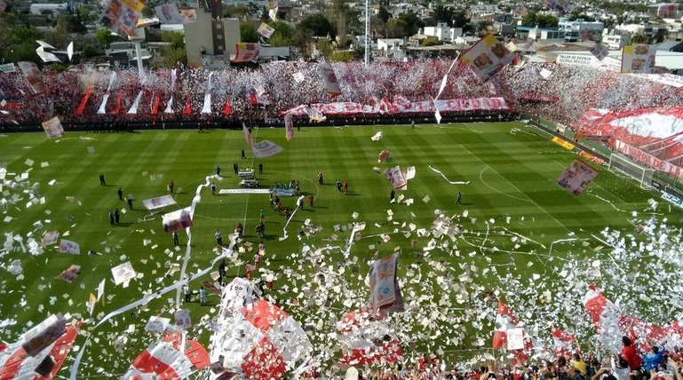 Recibimiento Hinchada Union